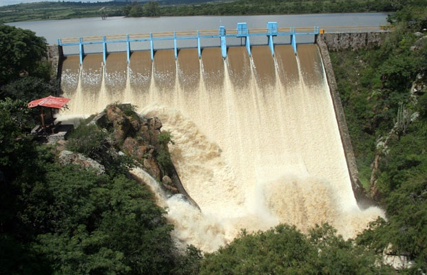 Cortina de la Presa de las adjuntas